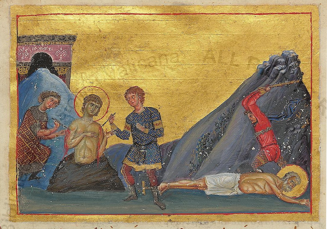 чудо Архистратига Михаила, бывшего в Хонех Miracle of the Archangel Michael at Colossae (Chonae) Константинополь. 985 г. Миниатюра Минология Василия II. Ватиканская библиотека. Рим.